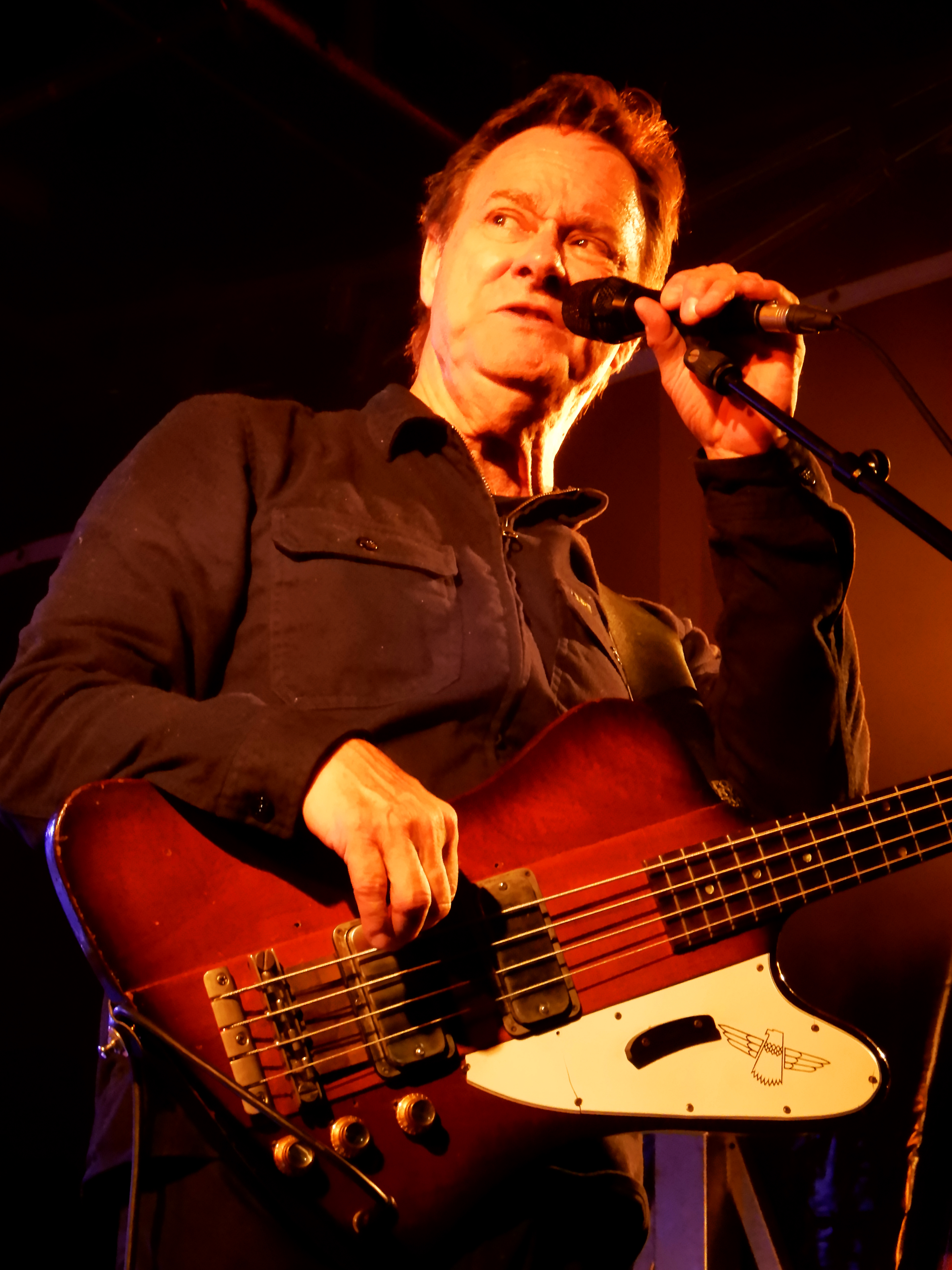 Cock Robin le 13 septembre 2019 à Grandchamp (44)